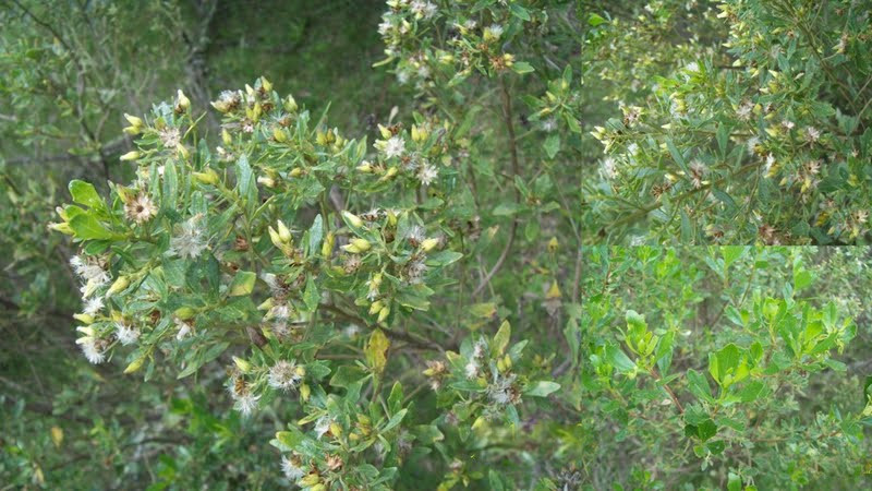 Baccharis tridentata. Asteraceae. Fotos tomadas en matorral serrano al margen de la Ruta 81 en Abras de Zabaleta, departamento de Lavalleja, Uruguay.